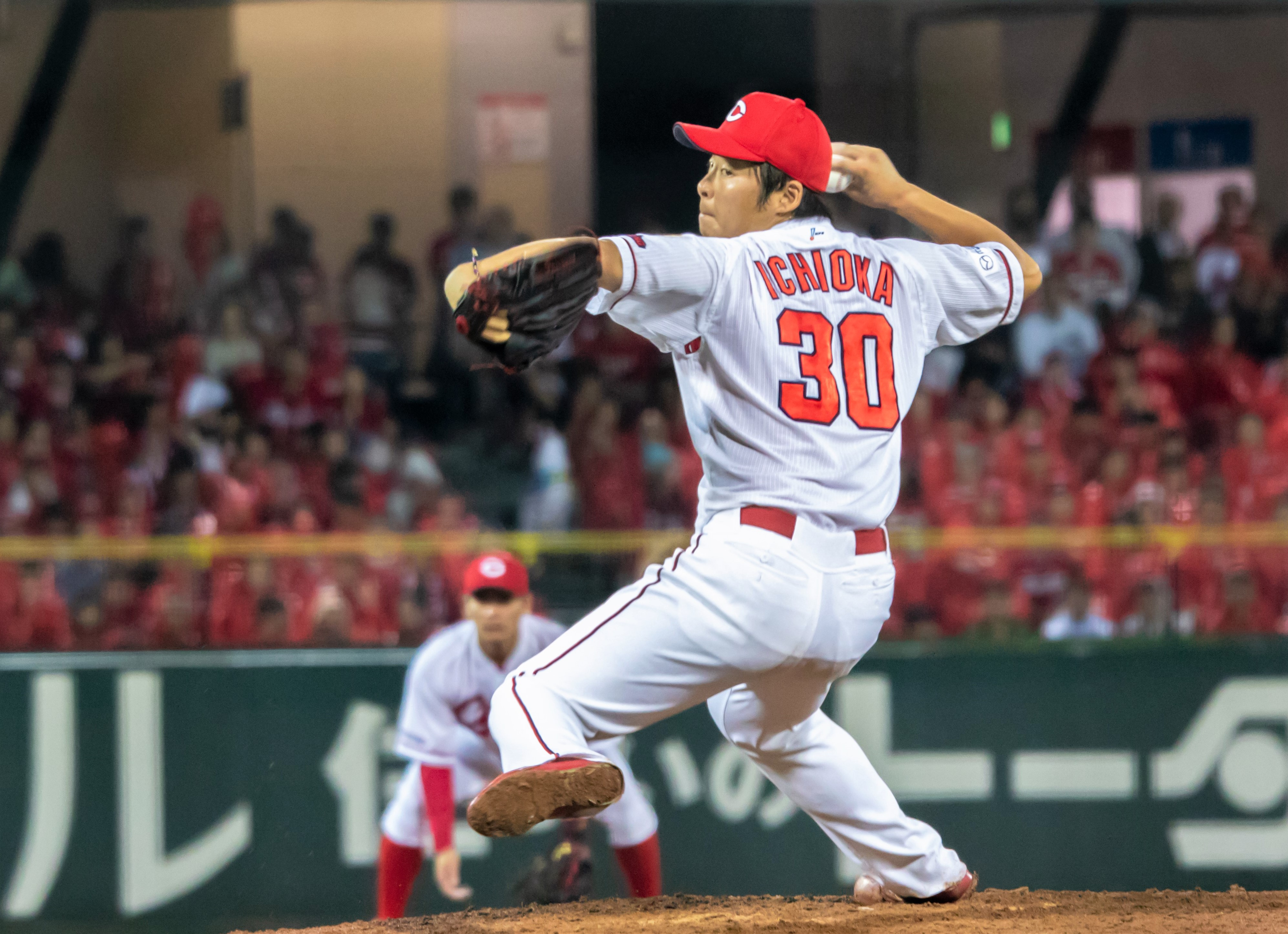 2018/9/12 マツダスタジアム